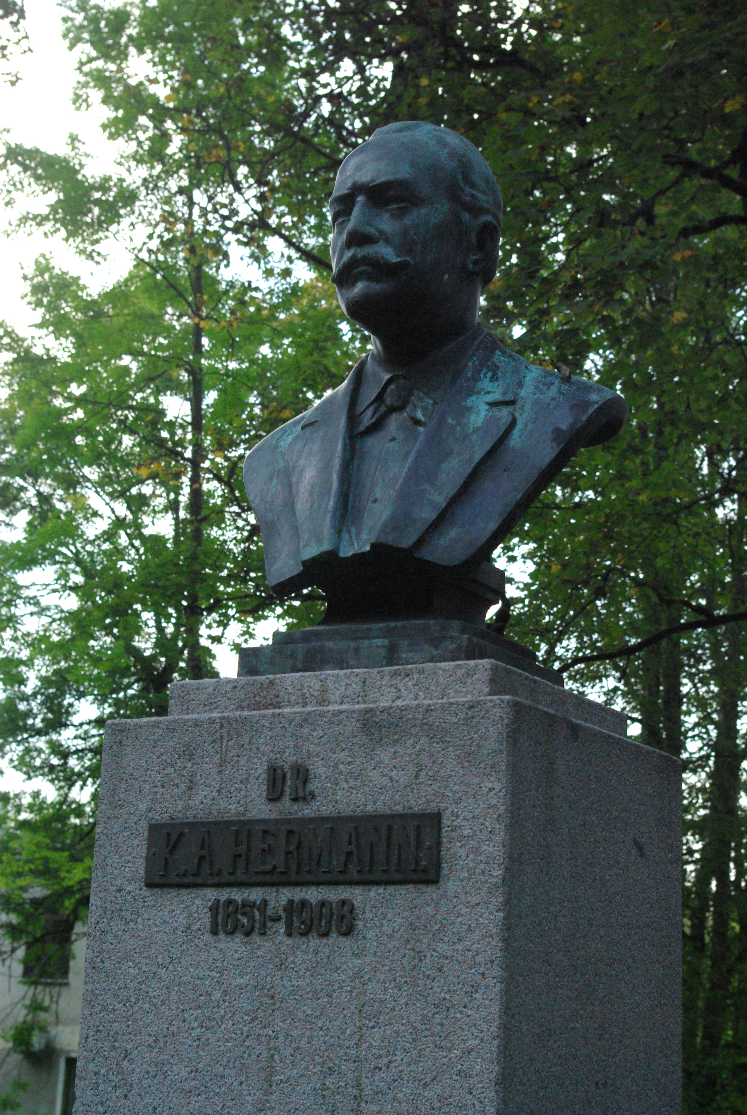 Karl August Hermanni monument